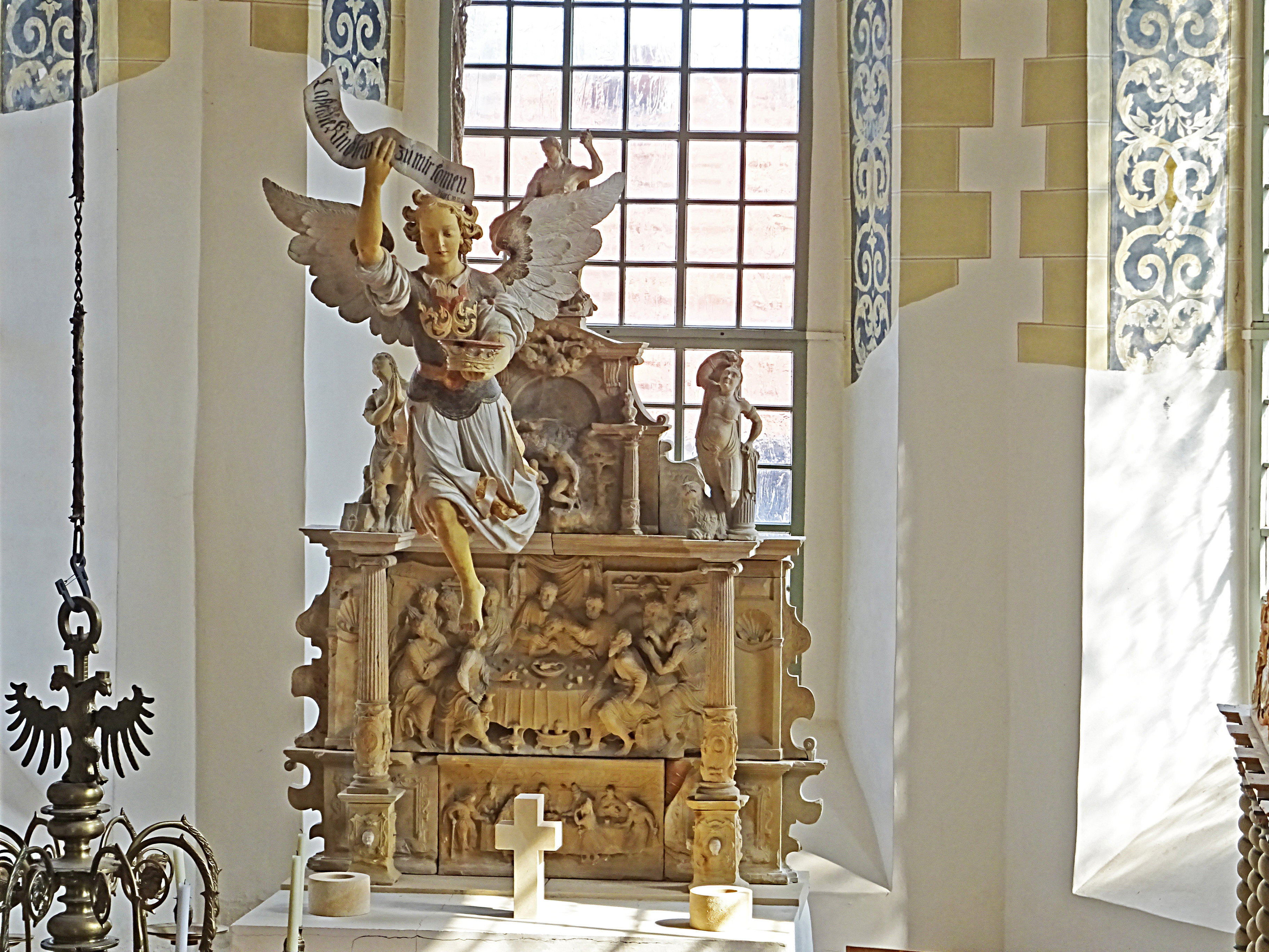 Sandstein-Altar aus dem 17.Jh. und schwebender Taufengel